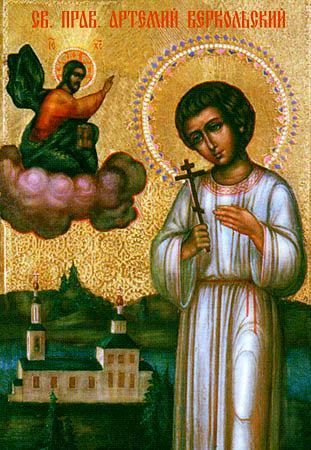 Икона св. праведного Артемия Веркольского